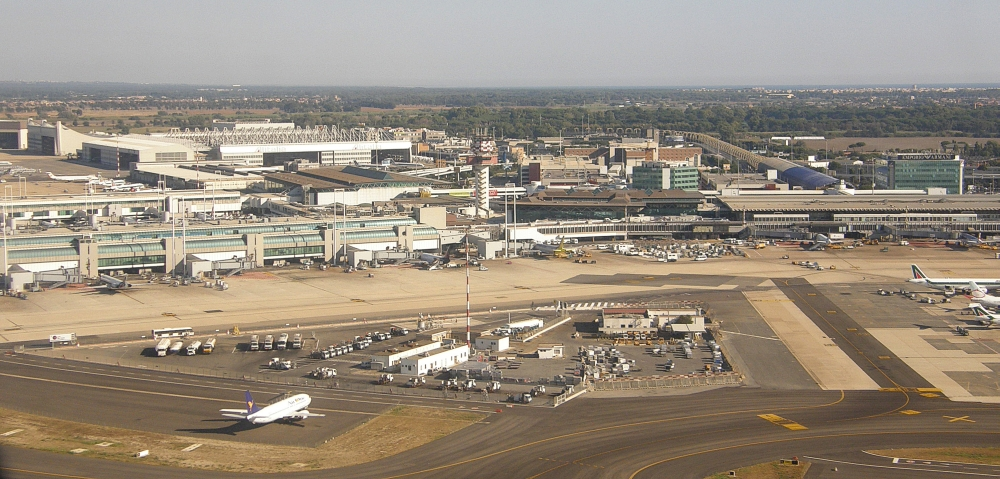 Fiumicino